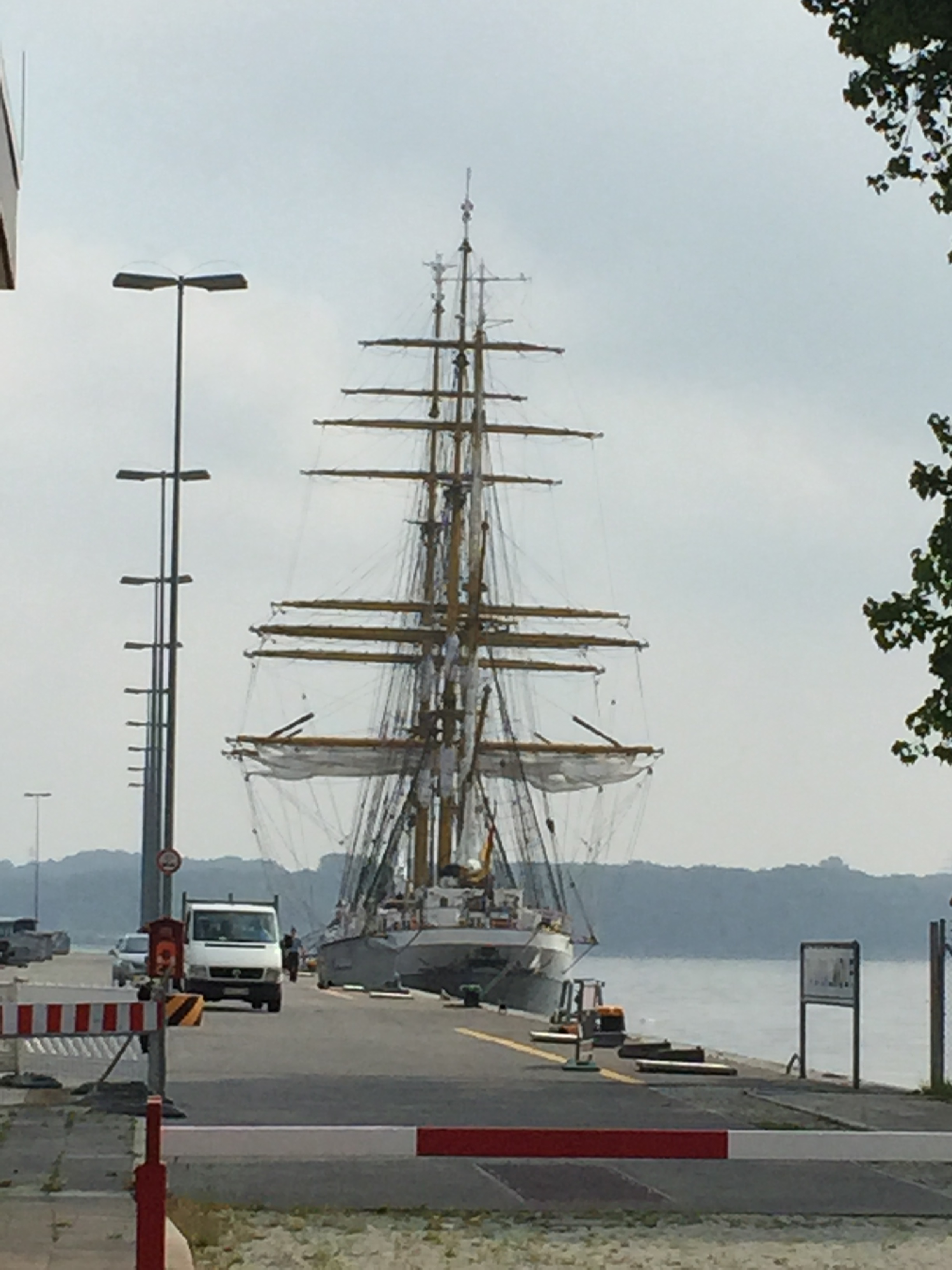 Gorch Fock - Heckansicht Tirpitzmole Kiel